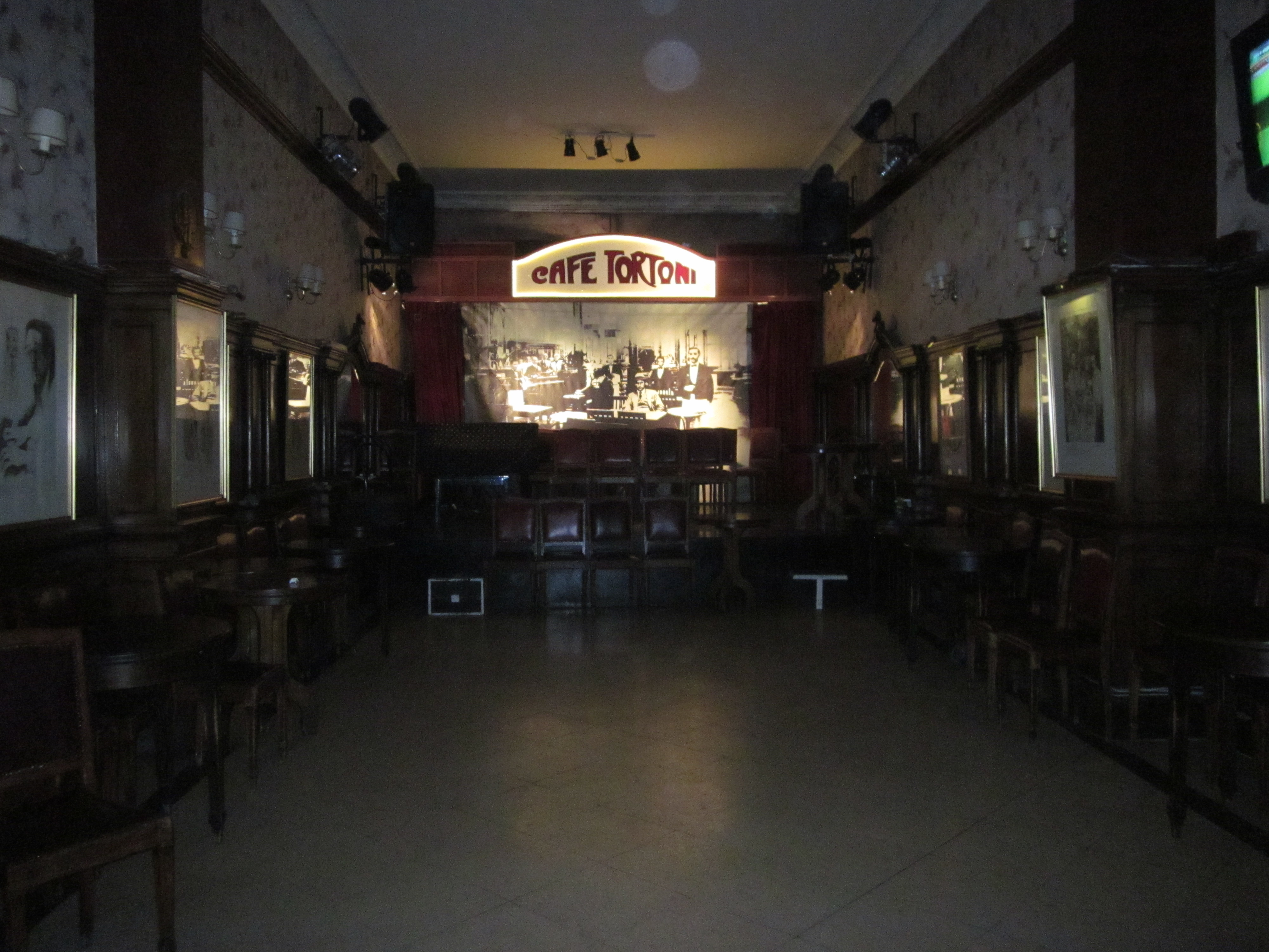 Interior del Café Tortoni, en donde se realiza La Peña, cuyas jornadas artísticas iniciaron en 1926